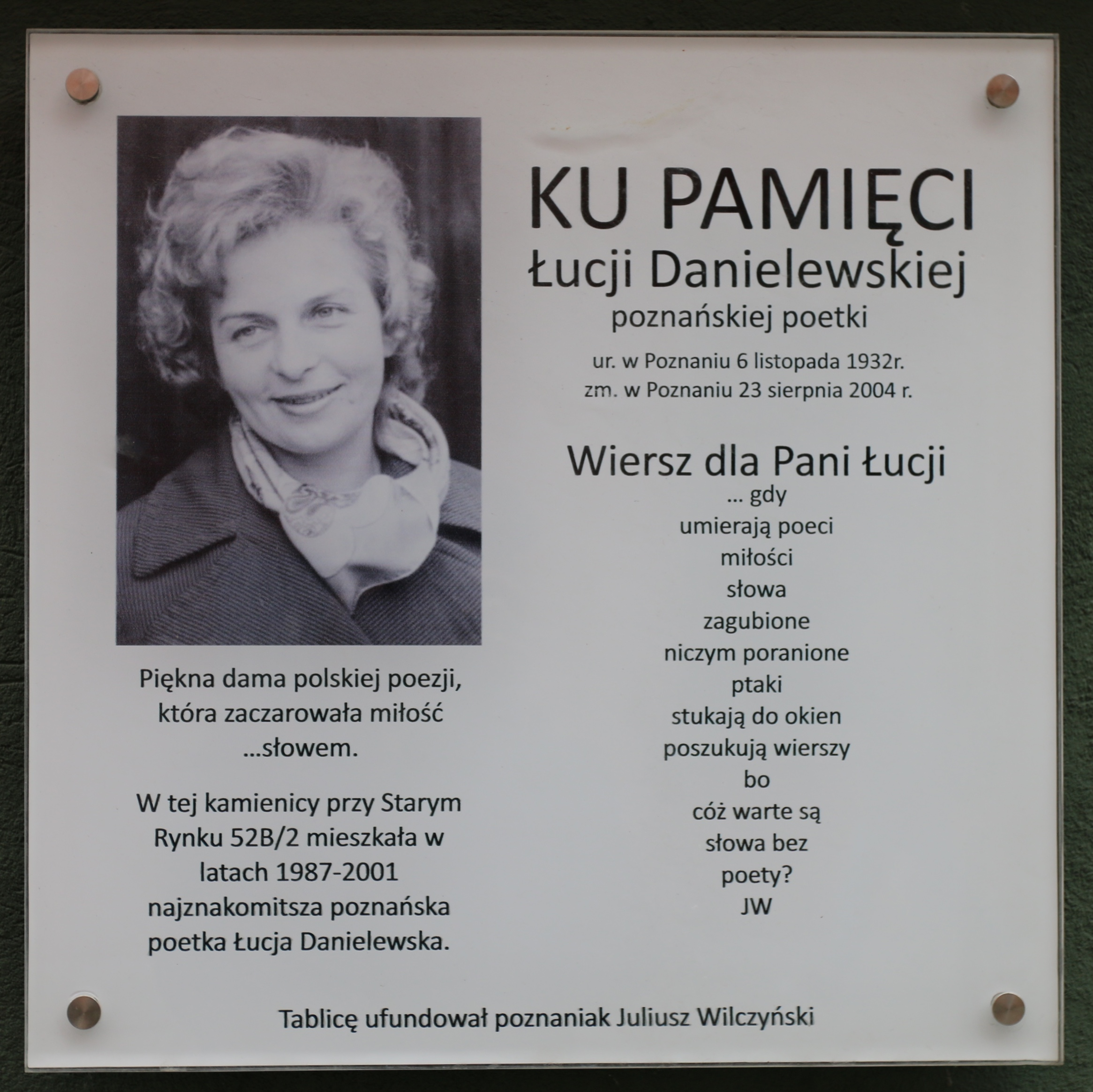 Tablica ku pamięci Łucji Danielewskiej